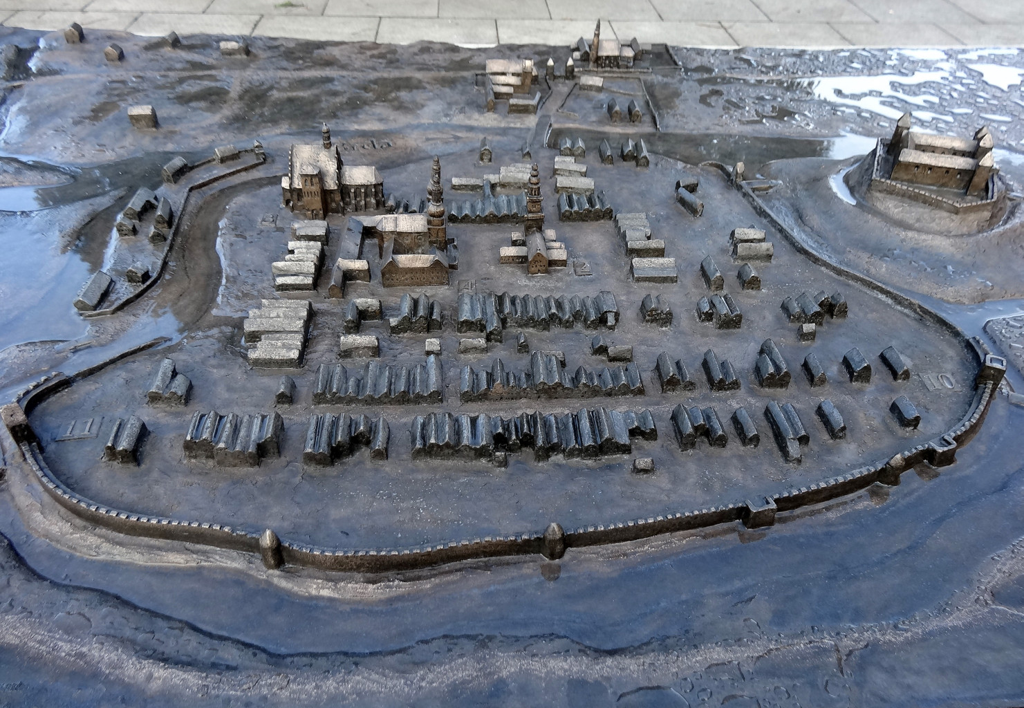 Płaskorzeźba miasta lokacyjnego Bydgoszczy z XVI-XVII w. stojąca na placu przy spichrzach